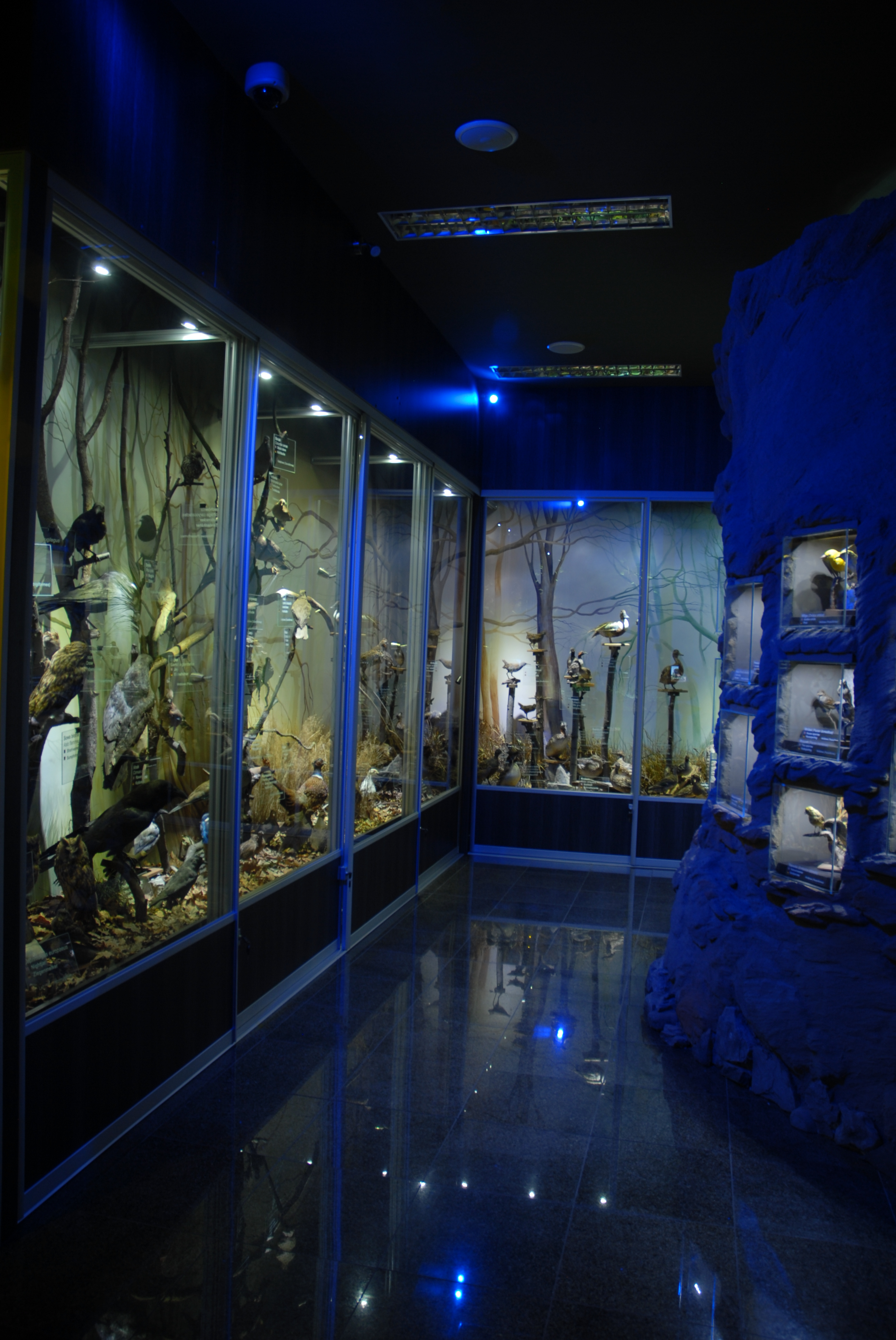 Wnętrze Muzeum K. i W. Tomków